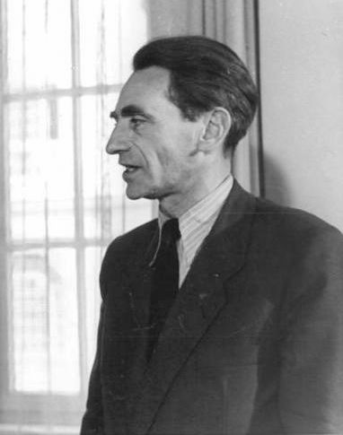 Zdjęcie Mieczysława Jastruna, fragment zdjęcia